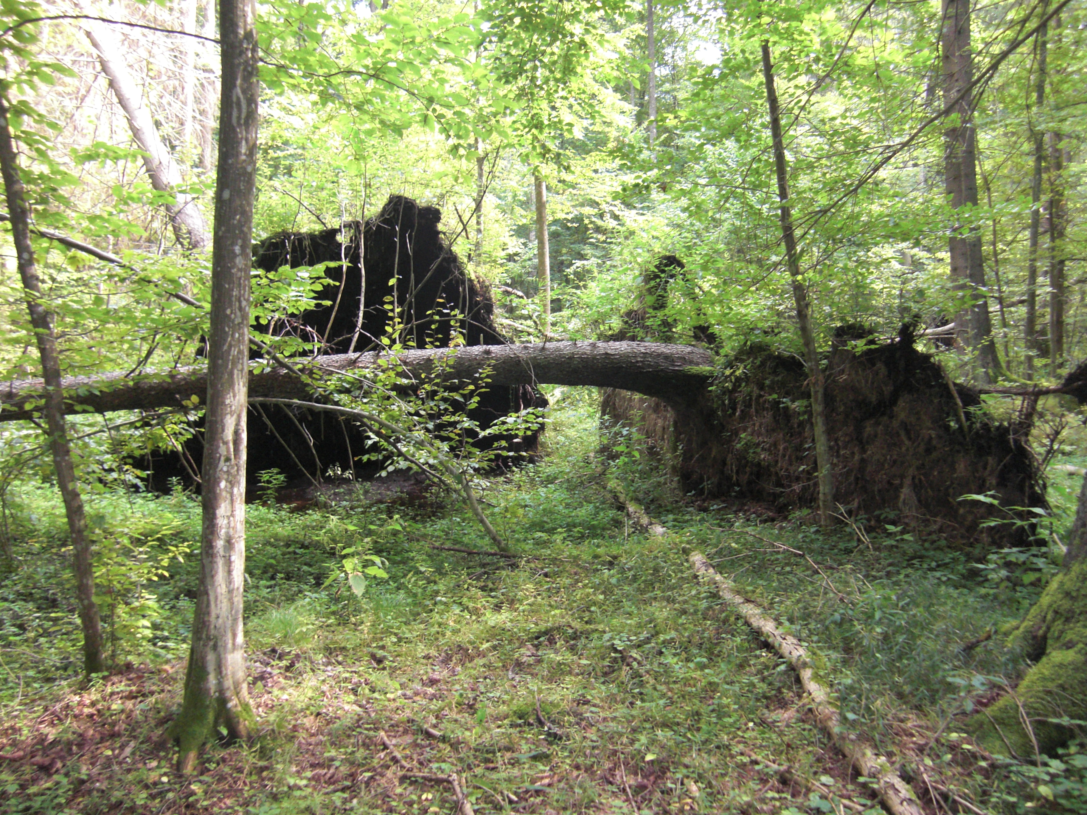 wywroty świerkowe